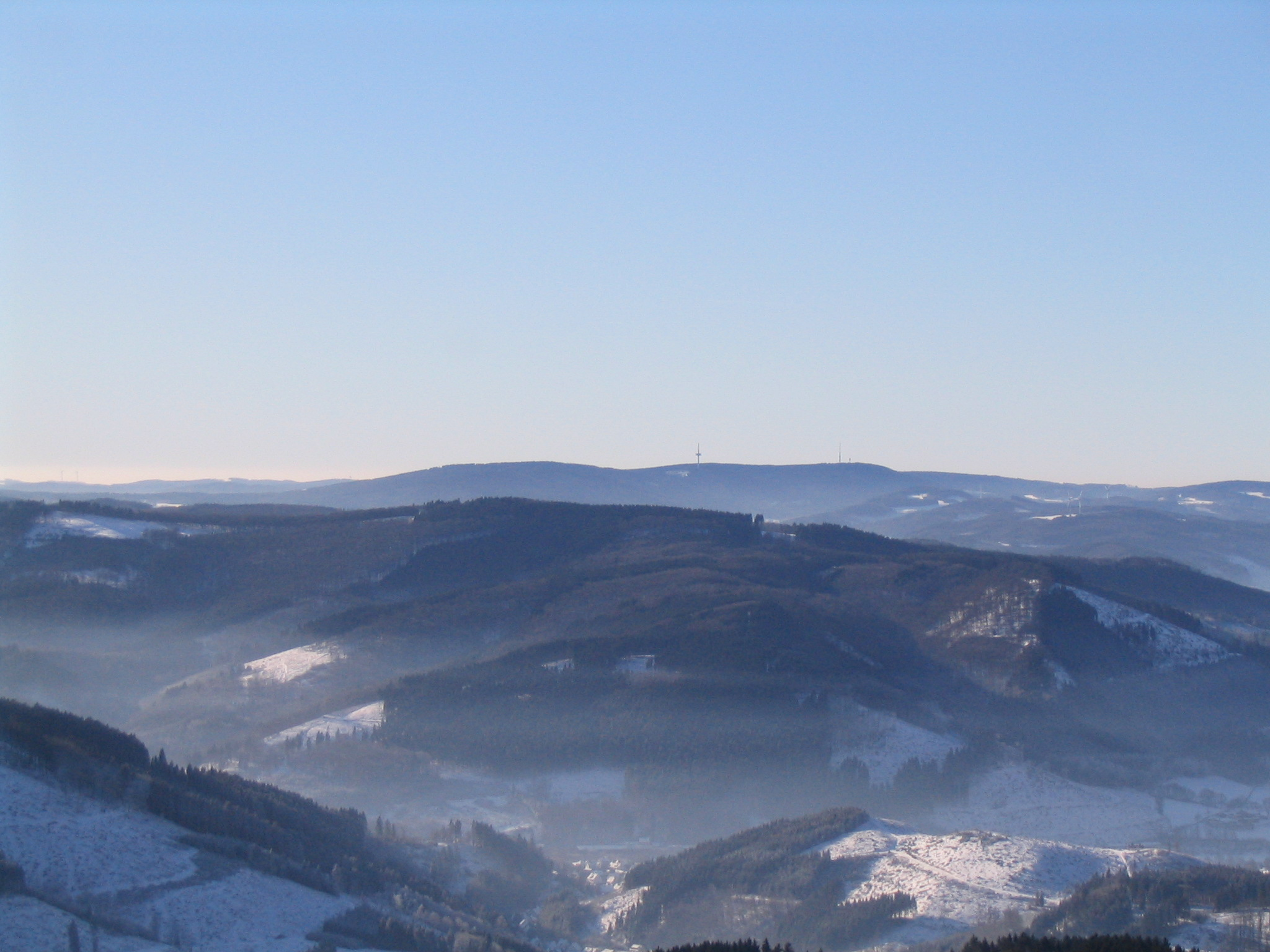 Blick vom Aussichtsturm auf dem Schomberg nach Südwesten zum Ebbegebirge